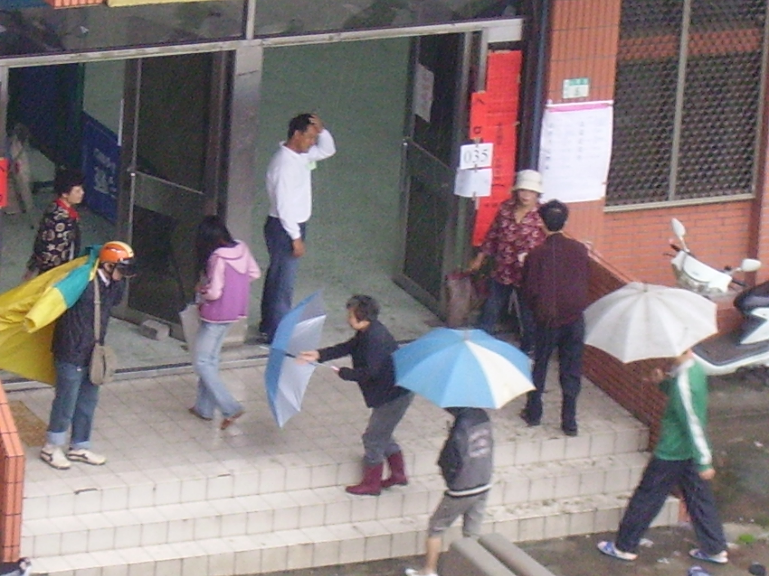 Taiwanflag-選舉